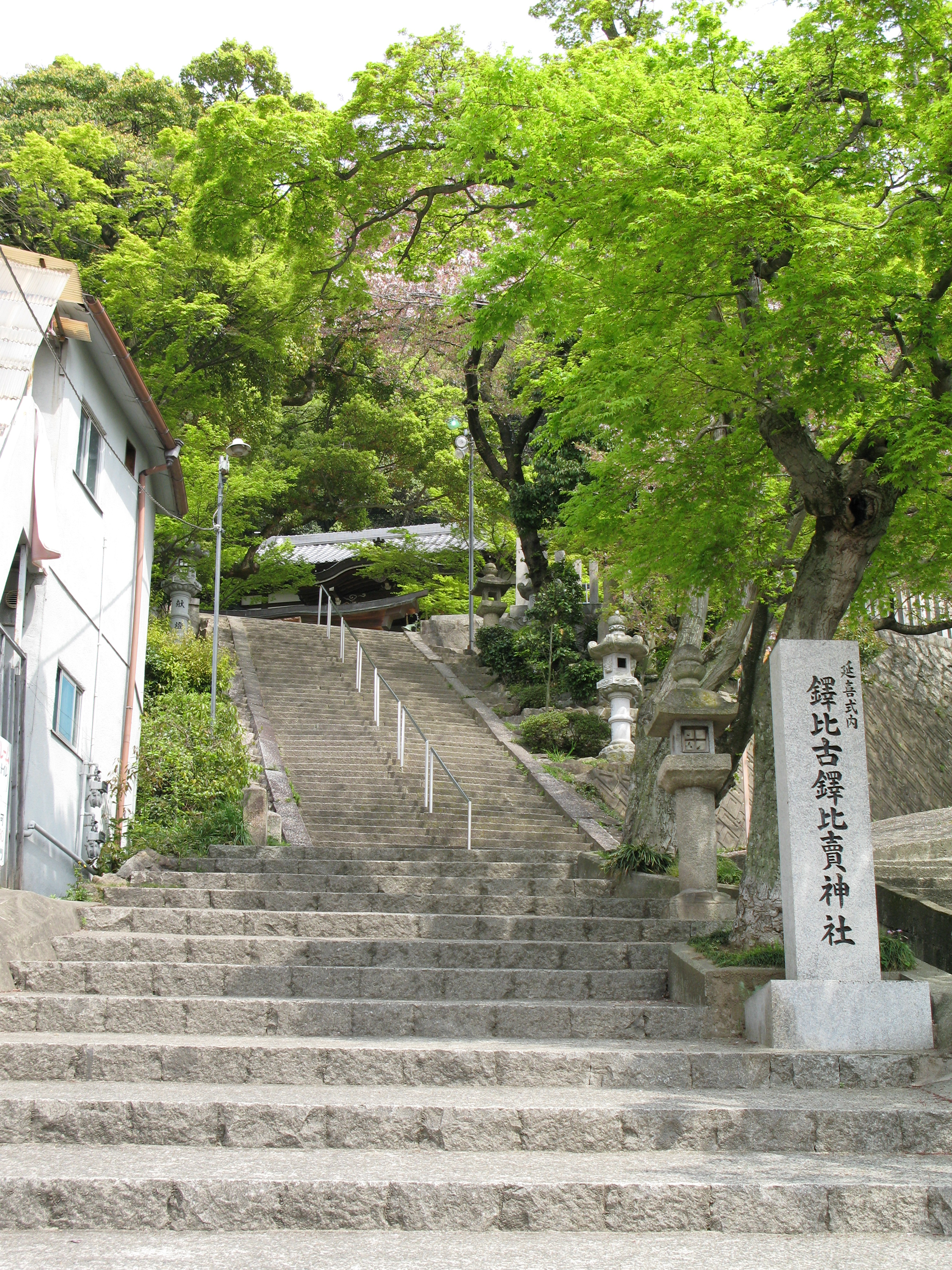 Nudehiko_Nudehime-Jinja in Kashiwara, Osaka, Japan